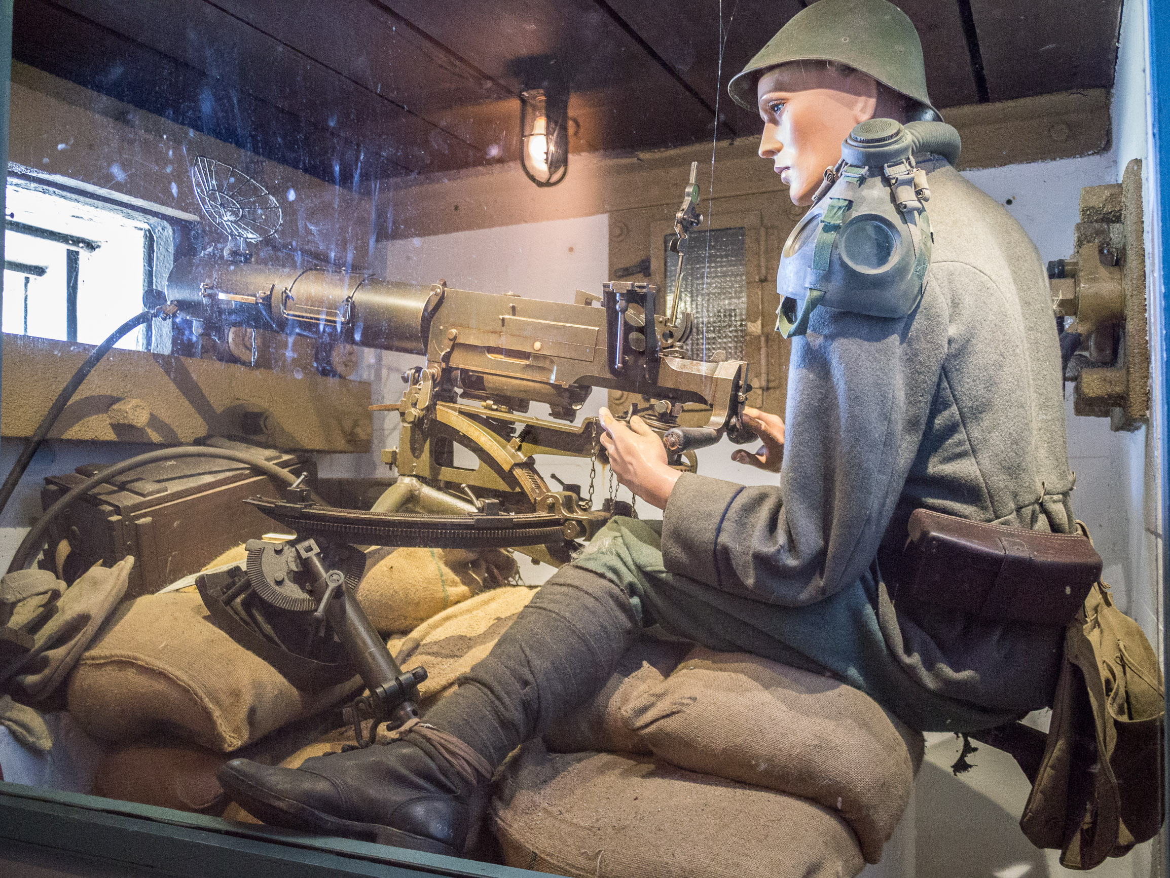 Kazemattenmuseum Kornwerderzand - Mitrailleur opstelling